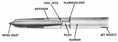 Ramjet engine